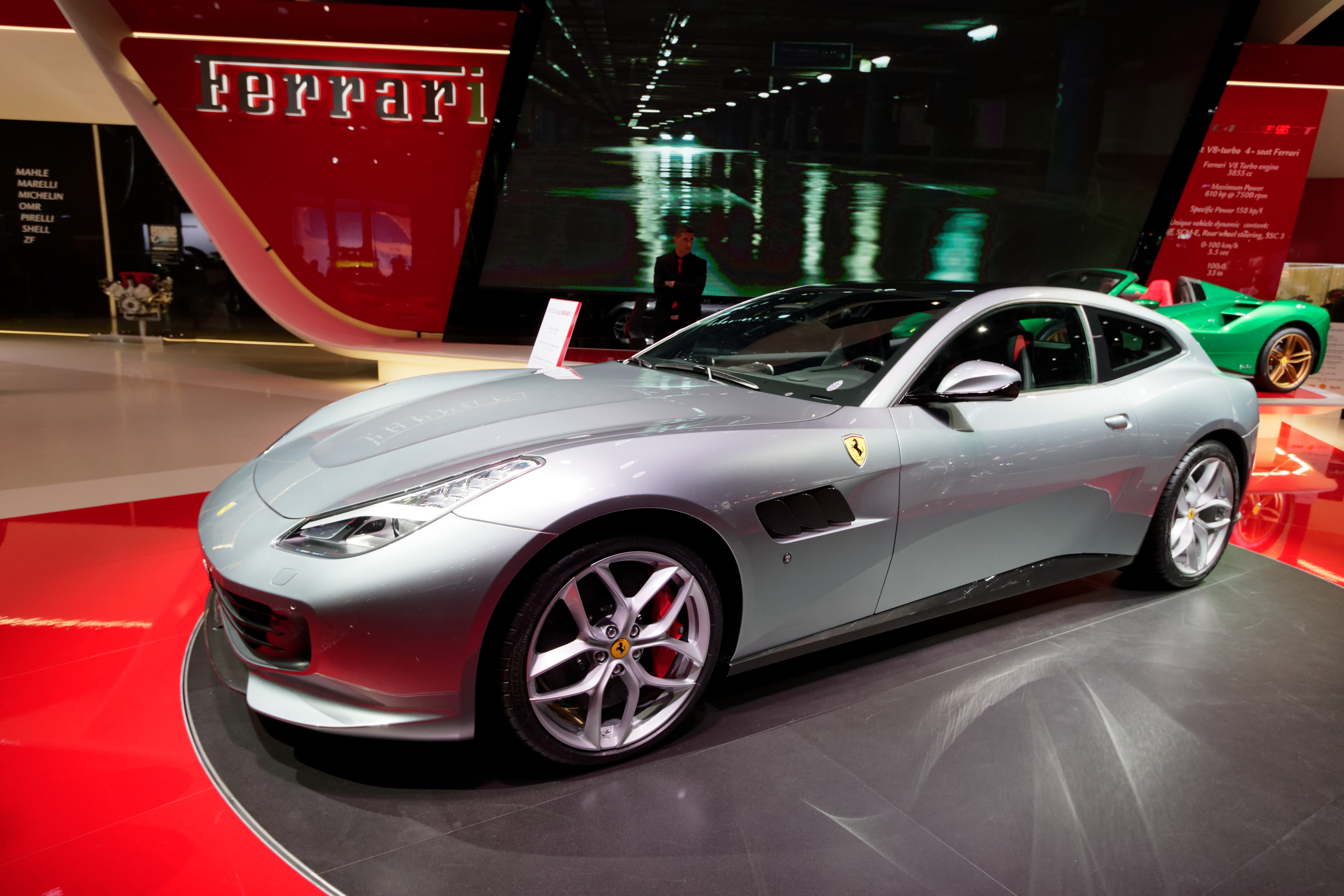 Une Ferrari GTC4 Lusso T présentée lors du mondial de l'automobile de Paris 2016.